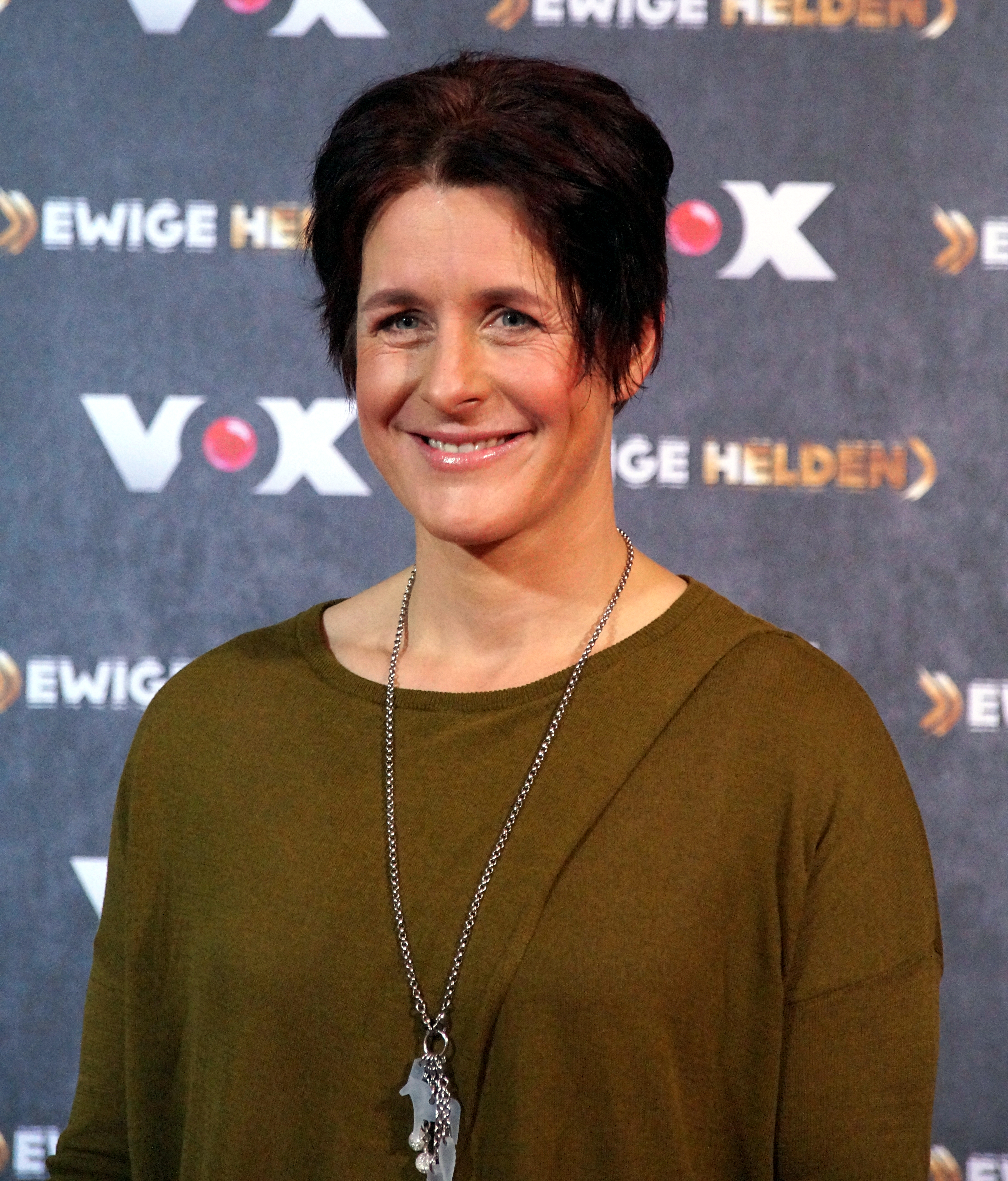 Uschi Disl beim VOX "Ewige Helden" Pressetermin, im Dezember 2015.